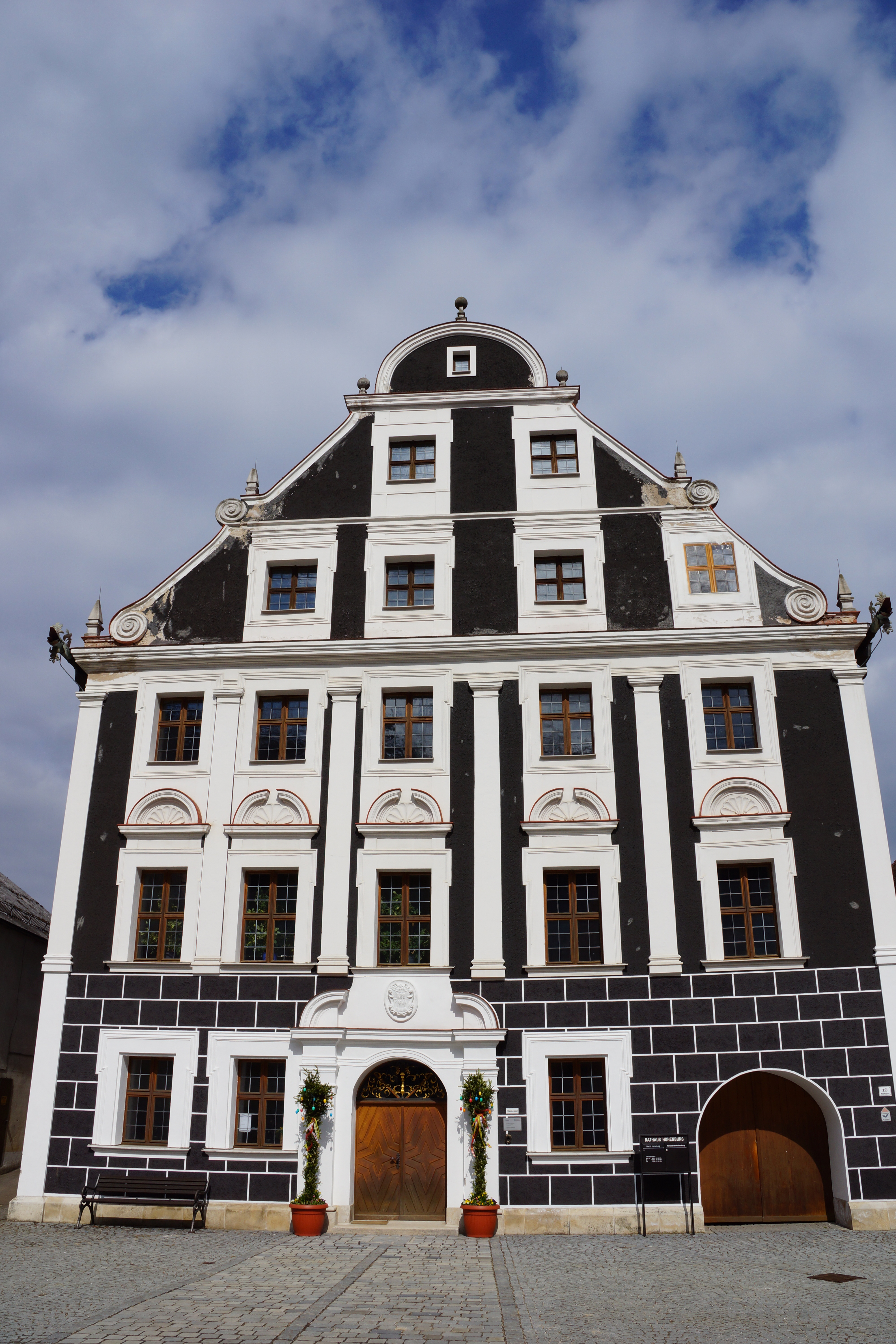 Der Markt Hohenburg im Lauterachtal